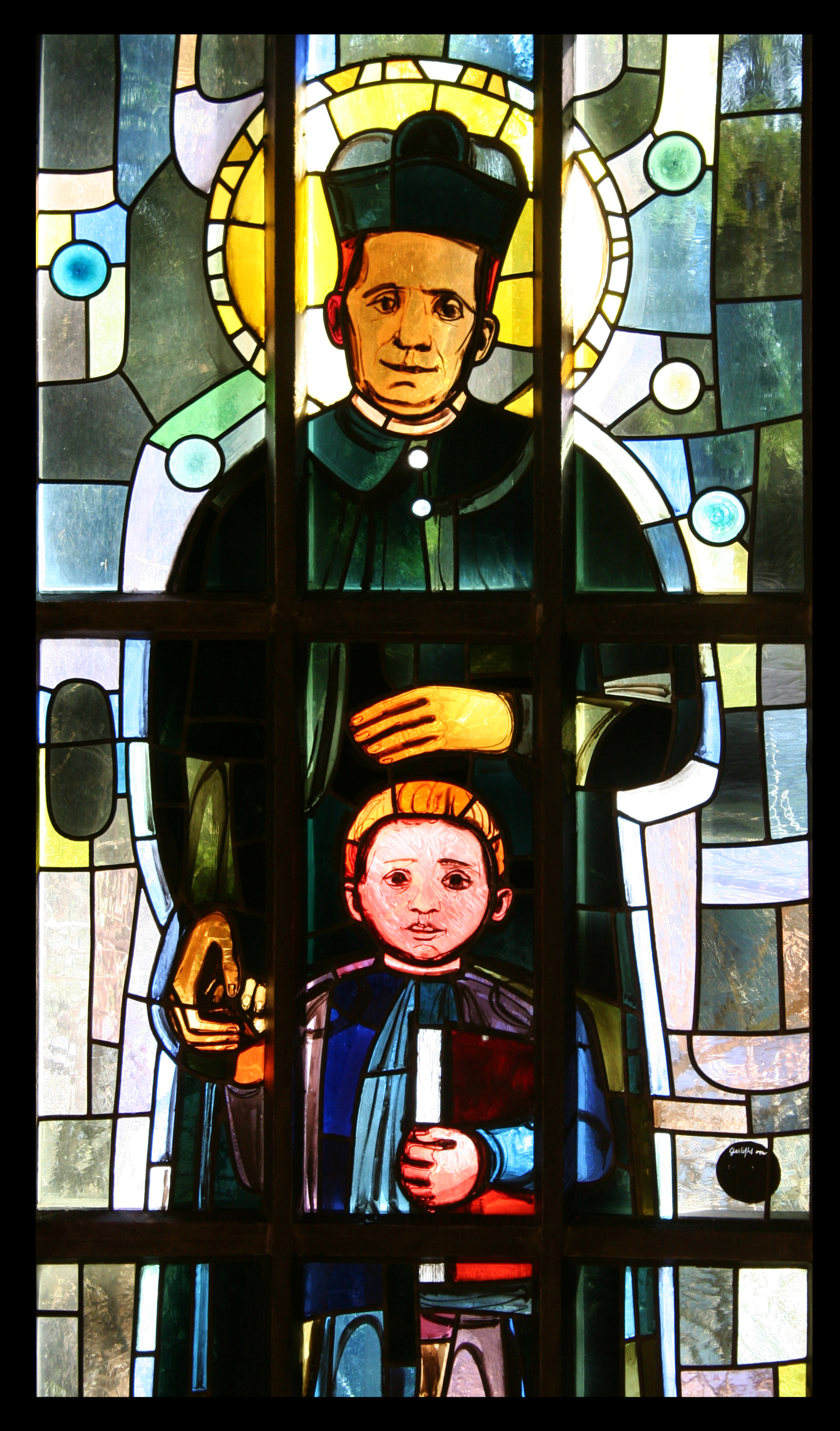 Römisch-katholische Pfarrkirche St. Karl Luzern, Don Bosco Fenster von Hans Stocker